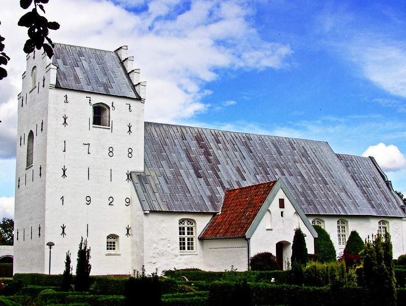 fra sydvest